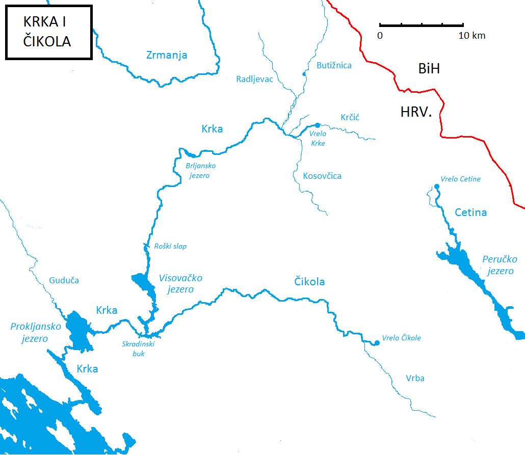 Крка и Чикола